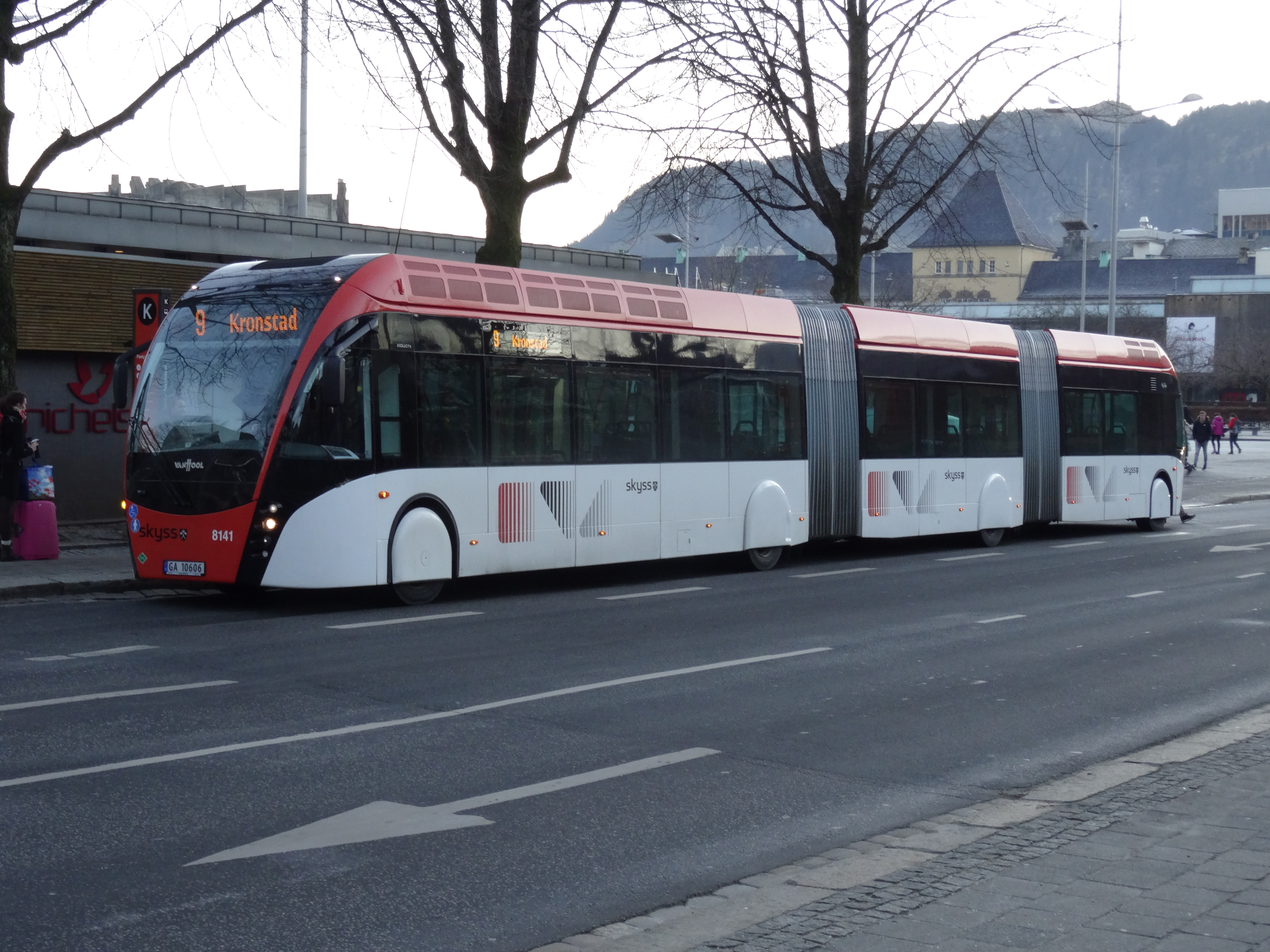 Bergen light rail / tram Byparken